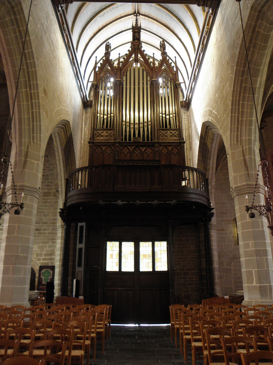 Grandes-Orgues Ducroquet, classées, de l'église Notre-Dame de Vitré (35).